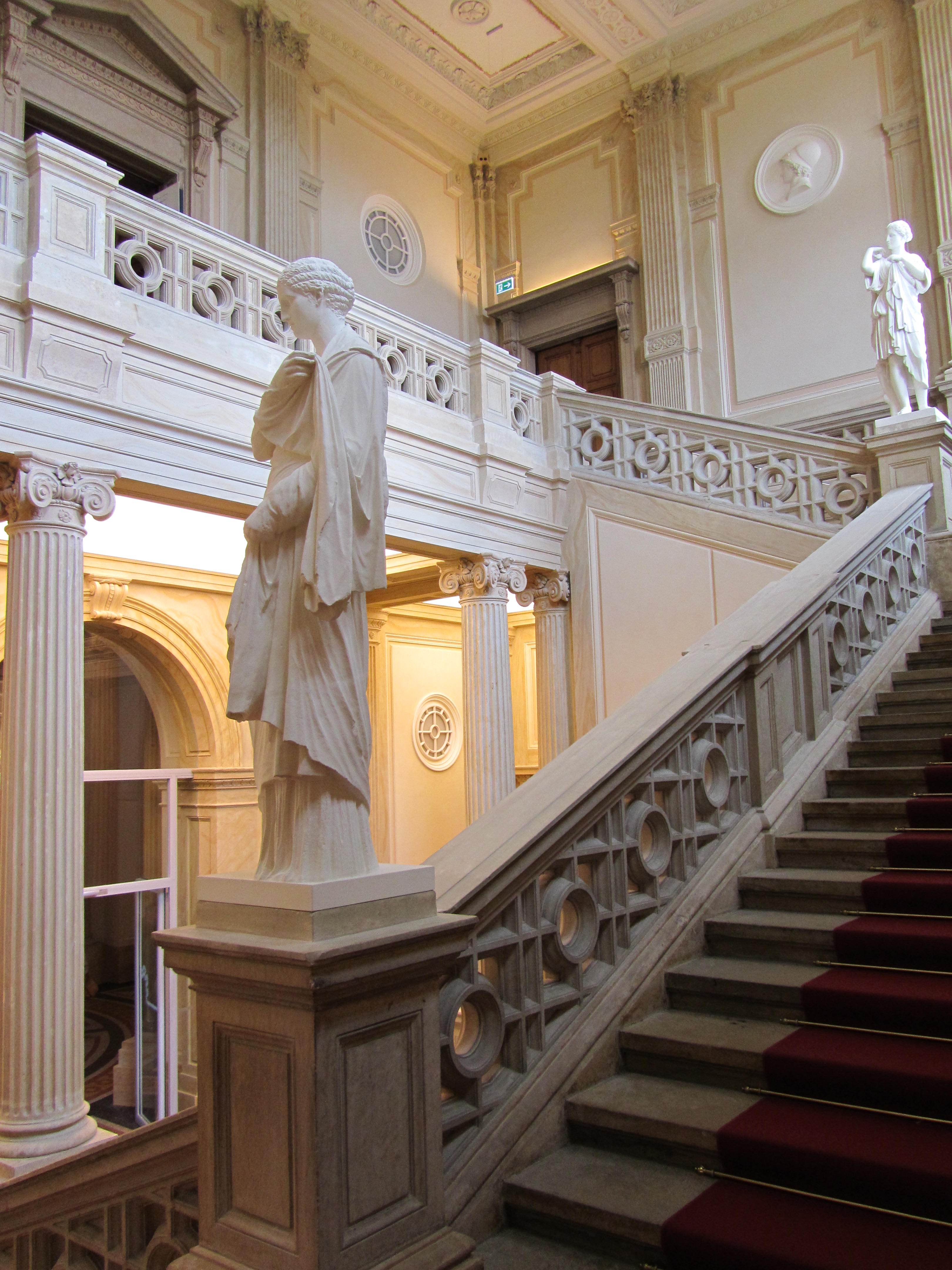 Treppenhaus des Herzoglichen Museums in Gotha (Thüringen).